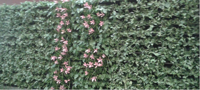 Maia Noorsalu loodud taimevaip Tartus Lõunakeskuses